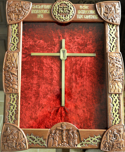 Реликварий с шипом от Тернового венца Господа Иисуса Христа, переданного в дар Русской православной семинарии во Франции Конгрегацией Сестер-помощниц и хранящегося в семинарском храме с апреля 2011 г.